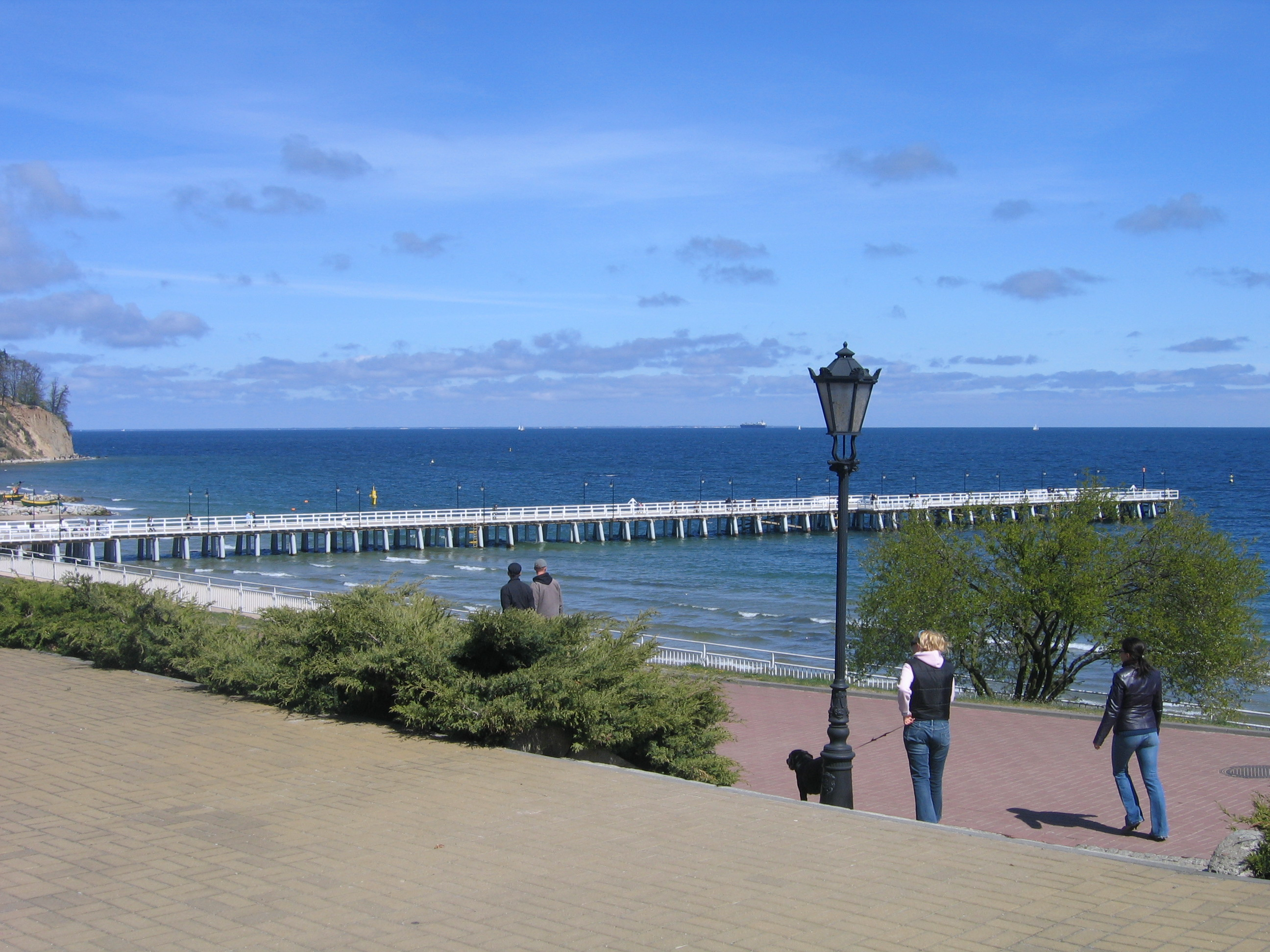 Molo w Gdyni-Orłowie (Poland).